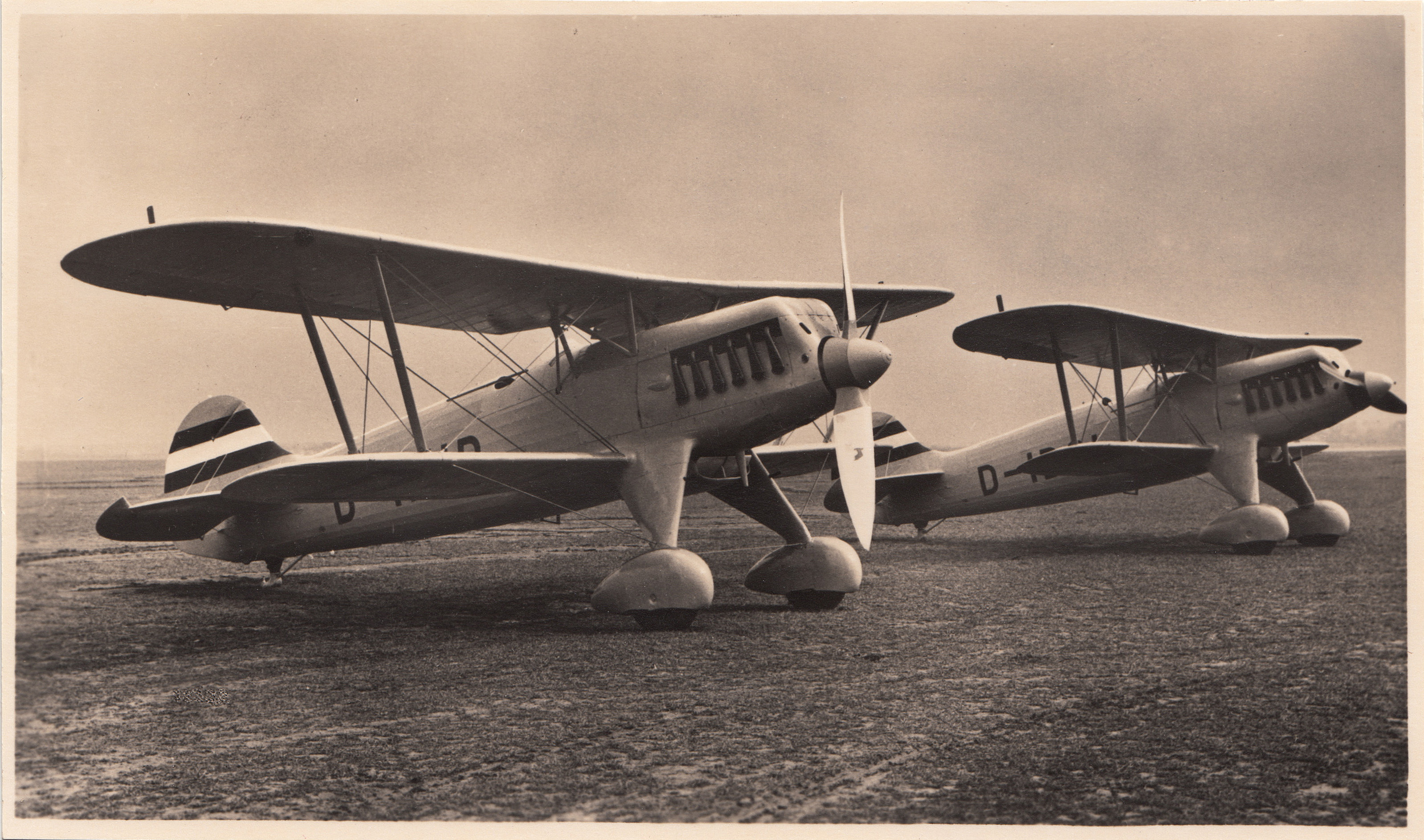 Deutscher Doppeldecker Heinkel He-51